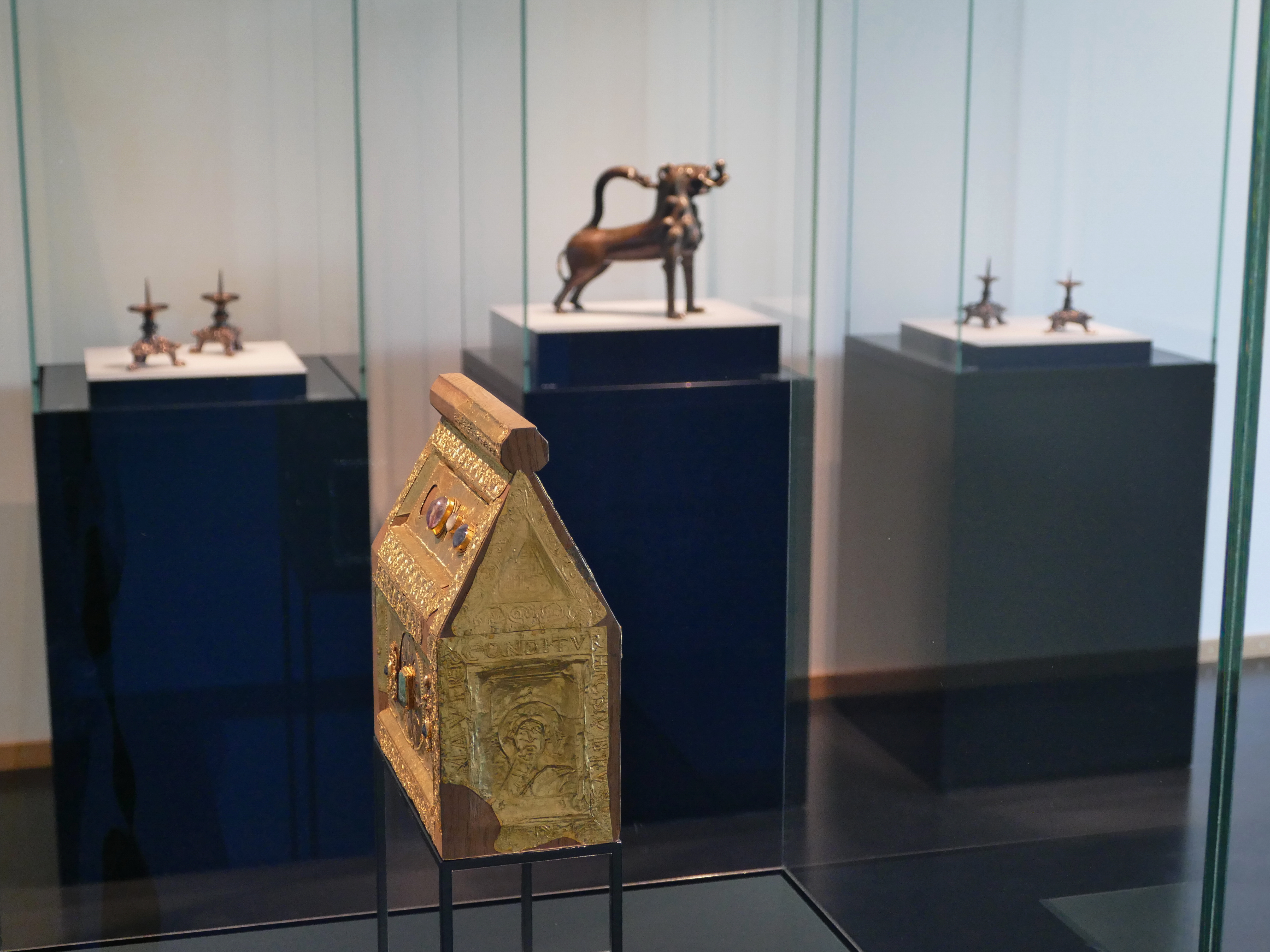 Domschatz Minden: Blick in die Ausstellung mit dem Petrischrein aus dem 11. Jahrhundert und dem Gießlöwen aus dem 12. Jahrhundert.